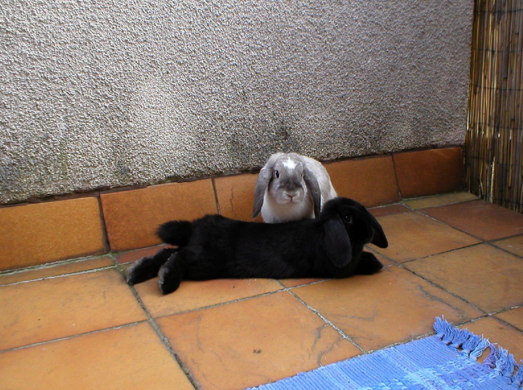 Zwergwidder/Widderkaninchen (Zwei Zwergwidderkaninchen-Weibchen.) --Jirjen 08:16, 10. Jun 2005 (CEST)